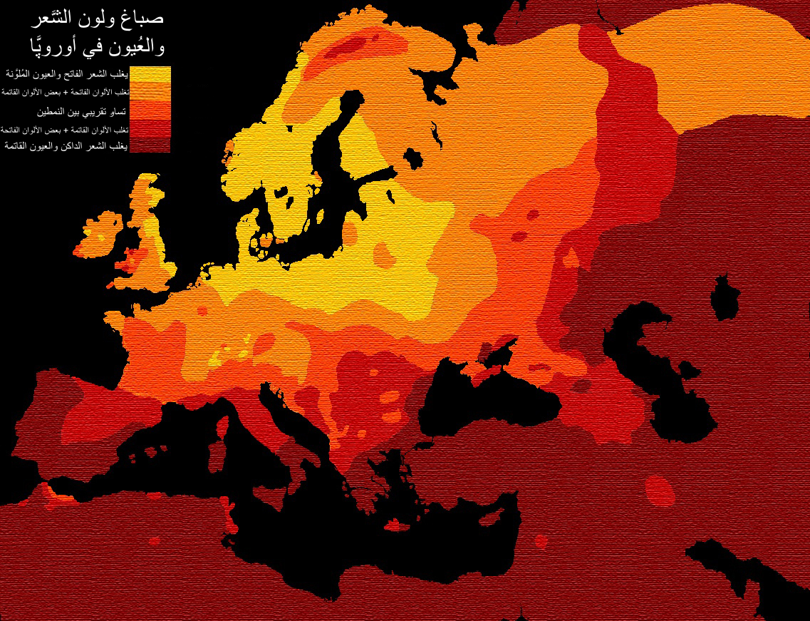 خارطة يظهر فيها توزّع صباغ الشعر والعيون في أوروپَّا.